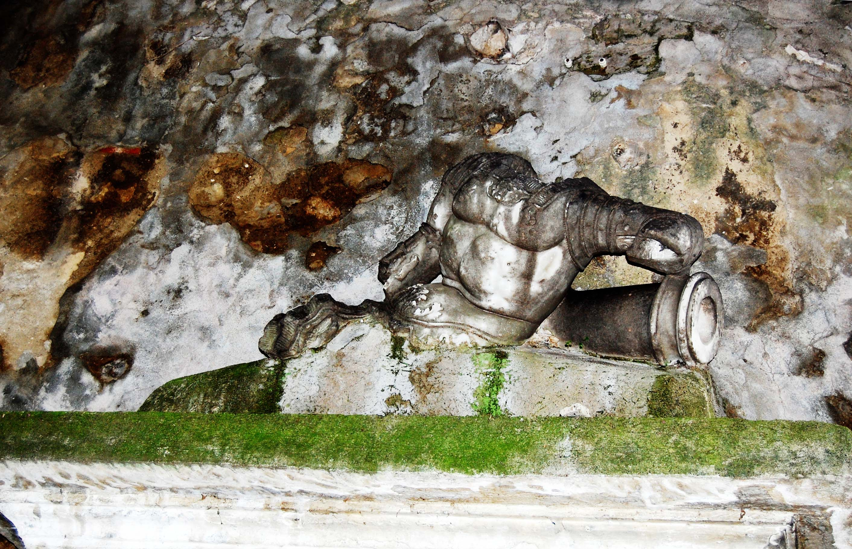 Villa comunale di Nocera Inferiore, particolare